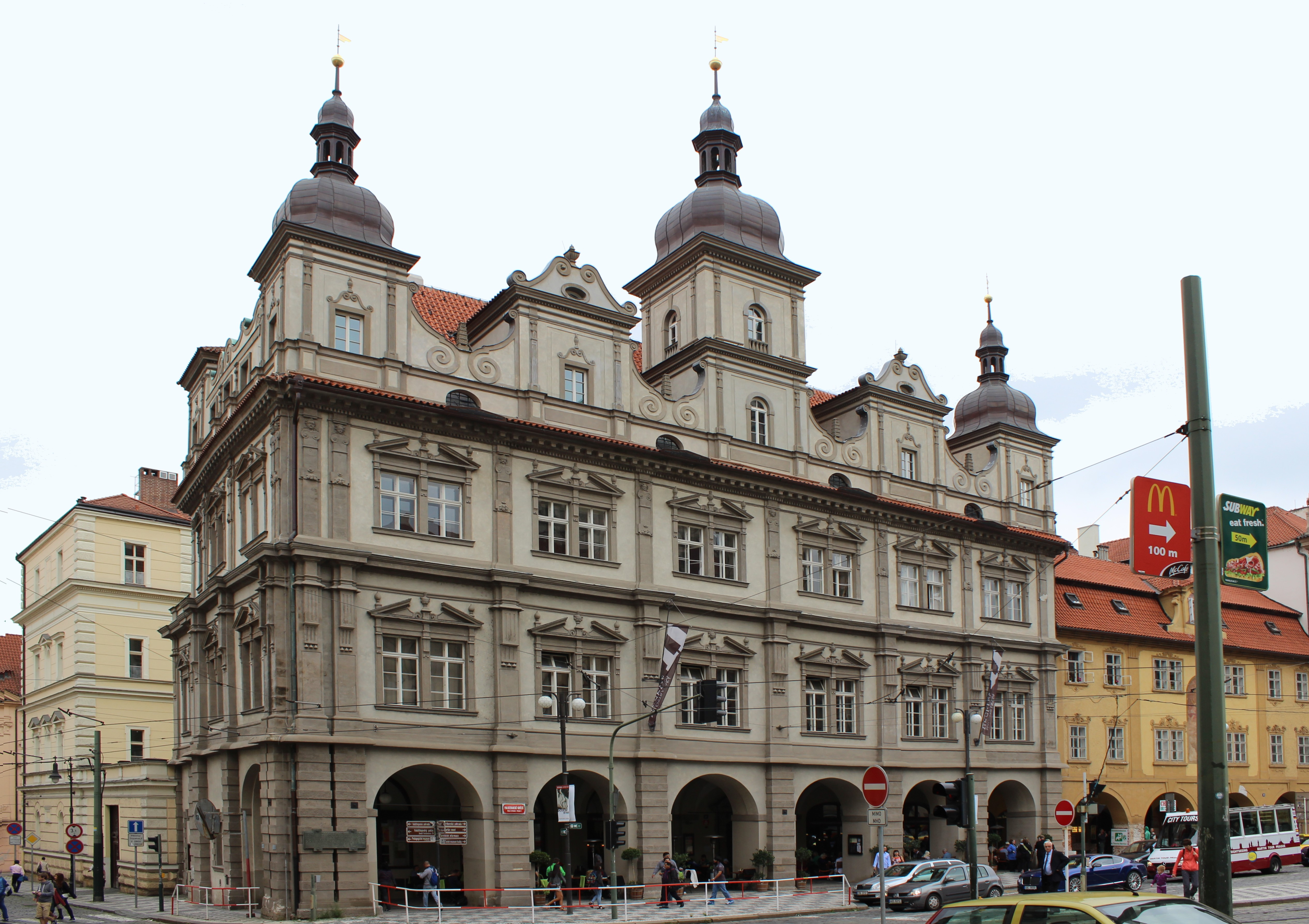 Budova Malostranské besedy na pražském Malostranském náměstí (pohled od severozápadu).